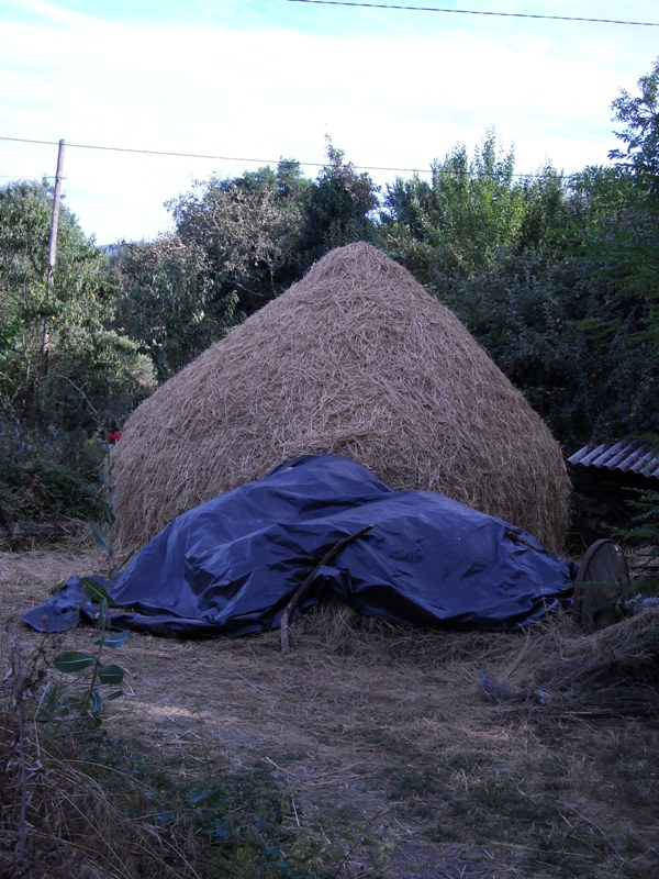 Estevesiños, parroquia de San Mamede de Estevesiños, concello de Monterrei, provincia de Ourense